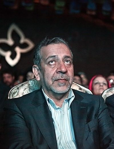 رسول زرگرپور - مهر ۱۳۹۲